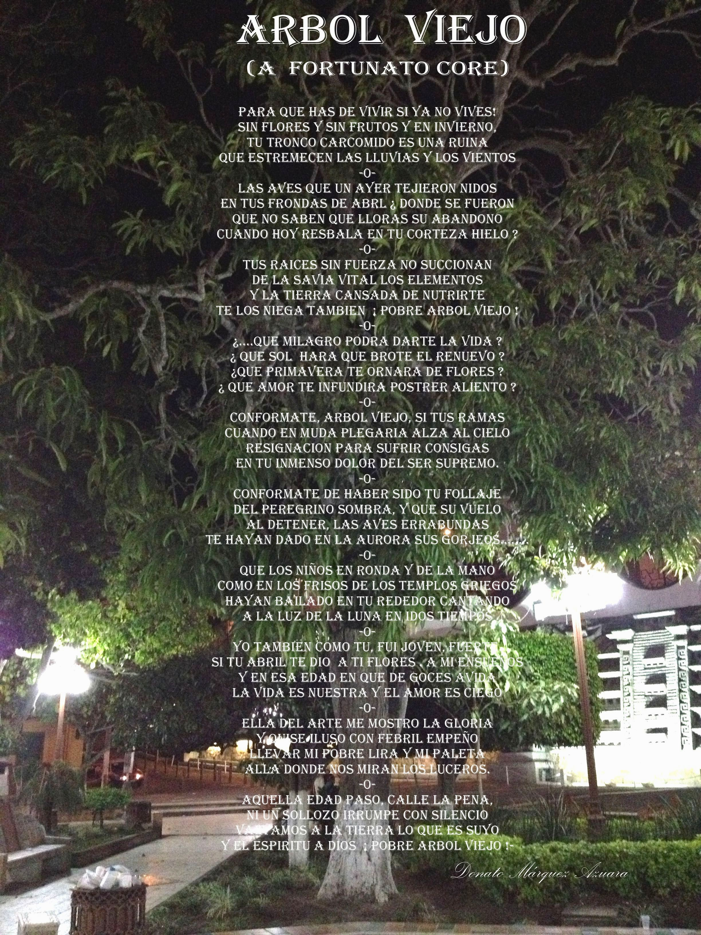 Poema de Arbol Viejo escrita por el Prof. Donato Márquez Azuara. Publicada en el periódico el Diario 30 de Oct 1959